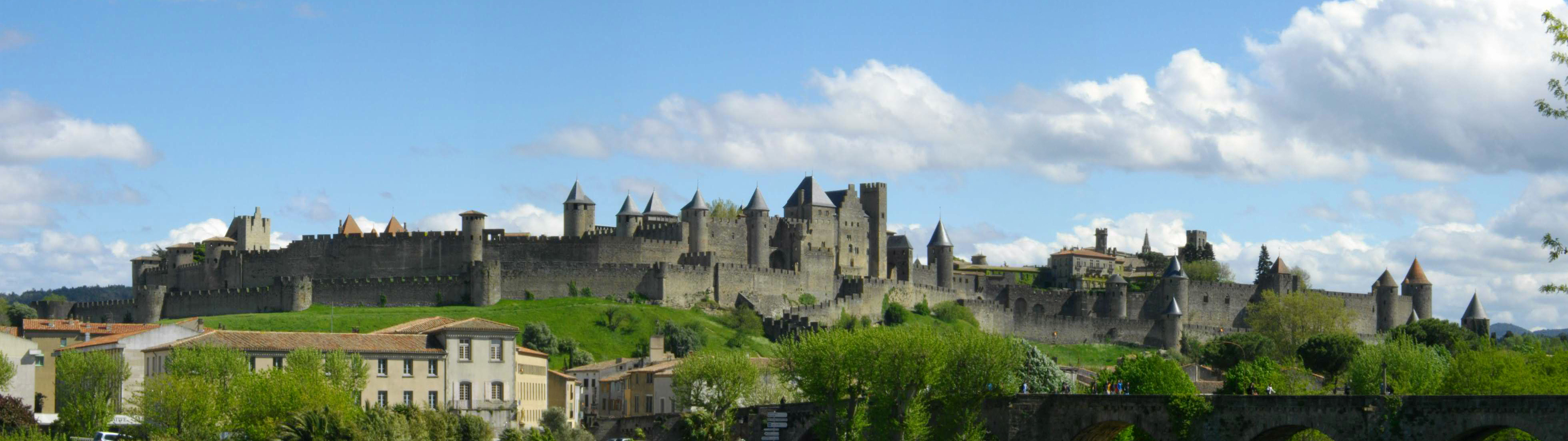 Panorama de la Cité de Carcassonne vu depuis le Pont-Neuf